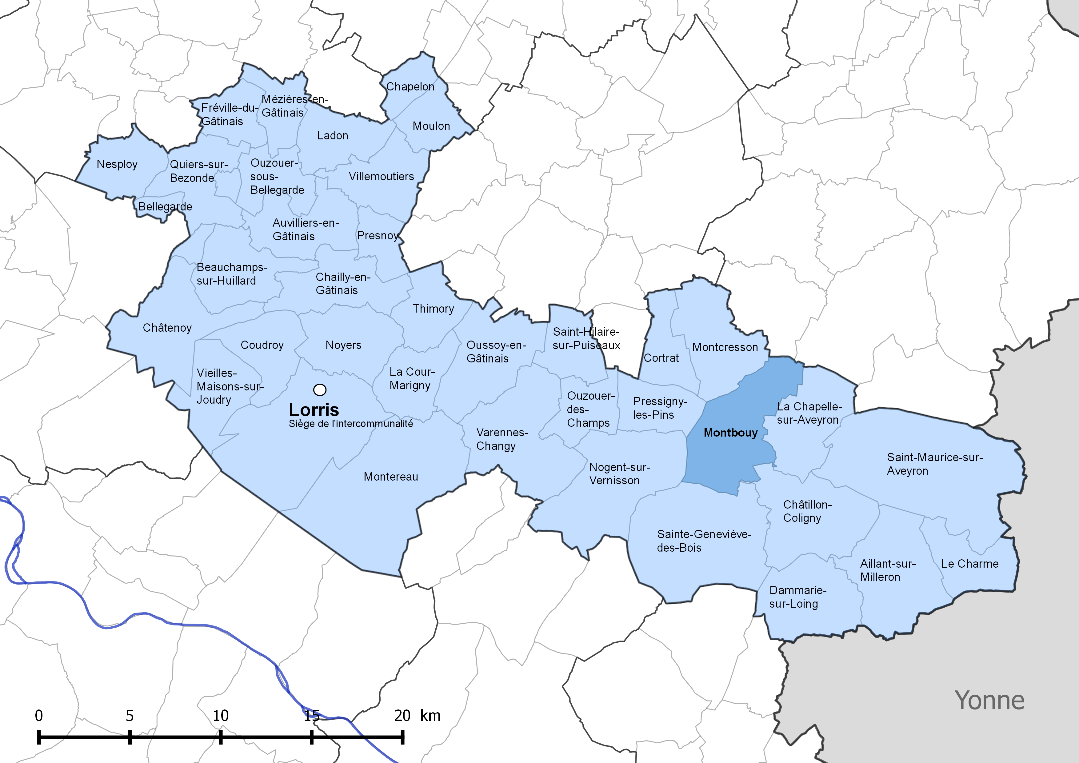 Périmètre de la communauté de communes Canaux et forêts en Gâtinais - Situation de la commune de Montbouy.